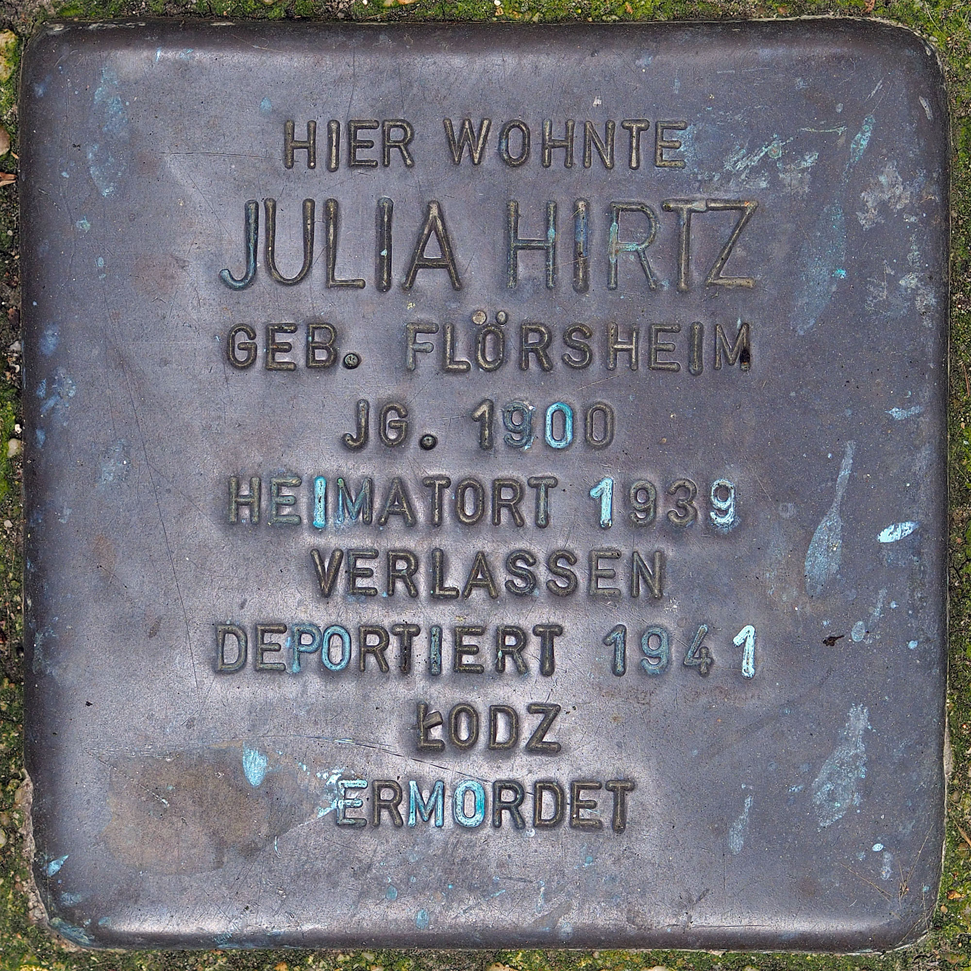 Stolpersteine GV: Hirtz, Julia